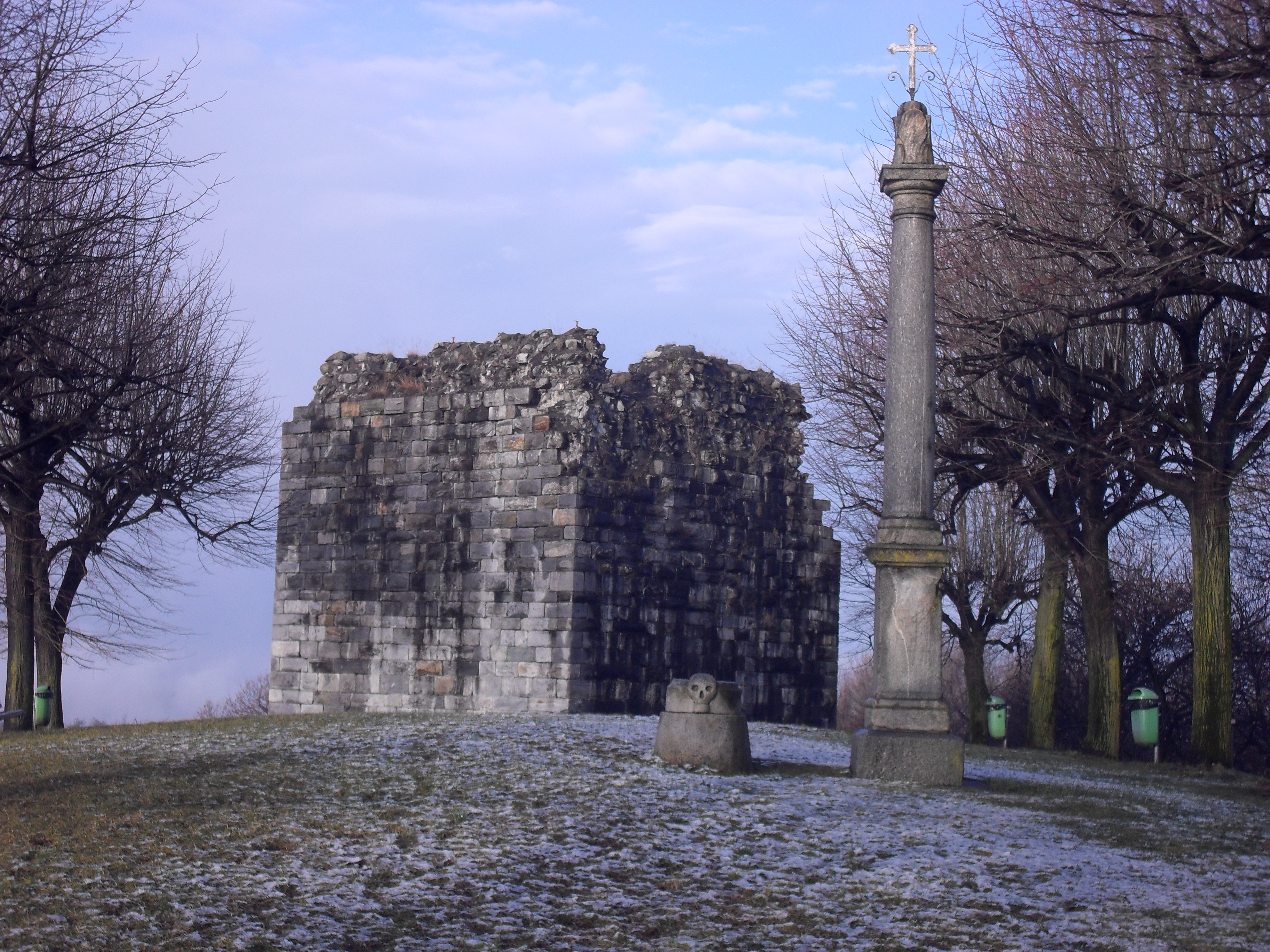 Torre di probabile origine bizantina in Rodero